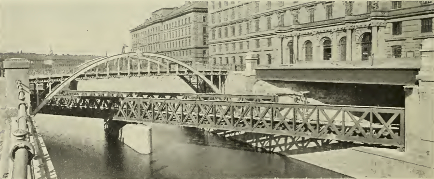 Wien - Brücke. Details siehe Dateiname.